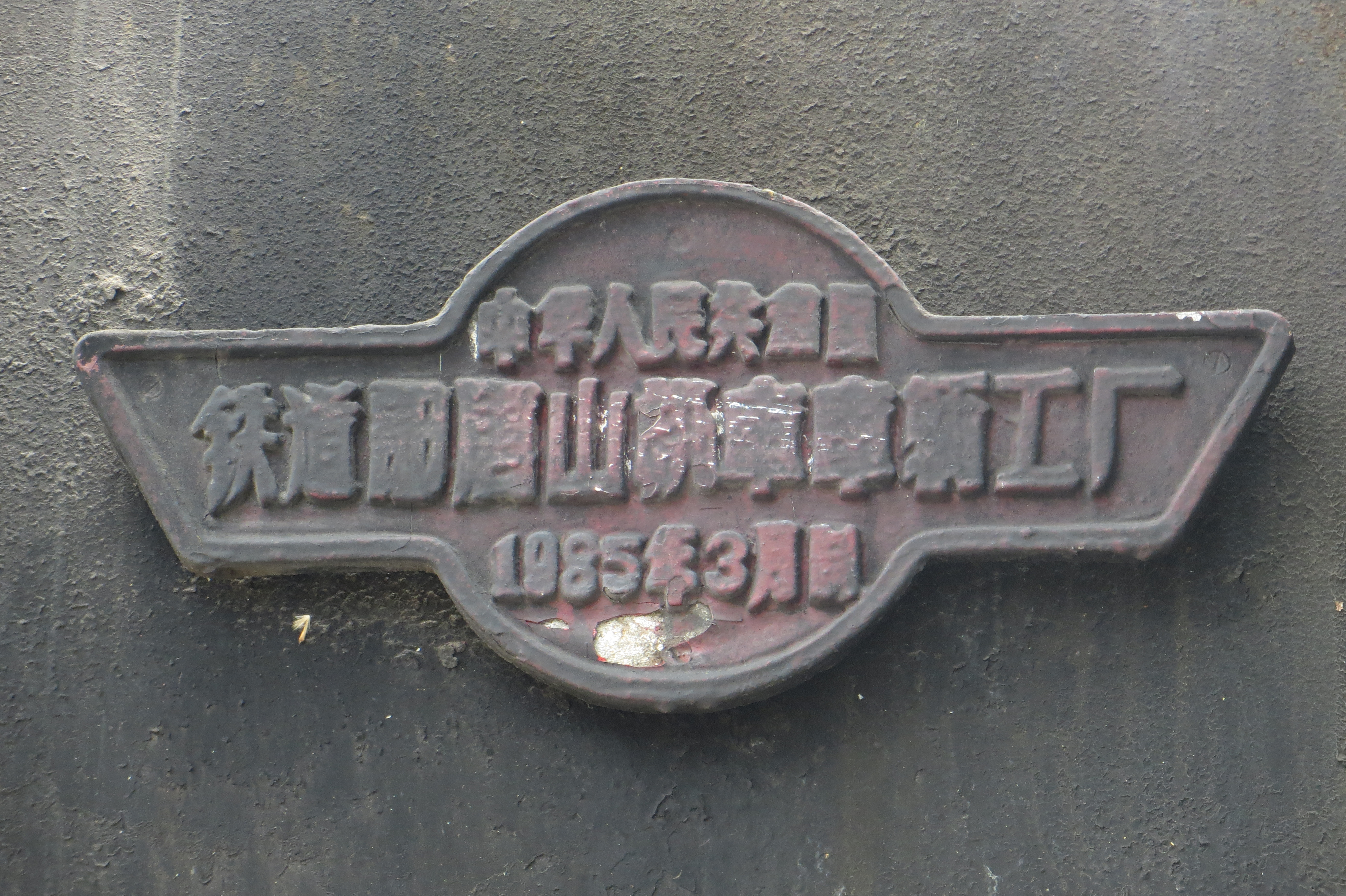 中文（中国大陆）: 上游1356蒸汽机车，唐山机车车辆厂1985年3月制。位于唐山开滦国家矿山公园中国铁路源头博物馆蒸汽机车观光园。